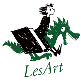 LesArt-Logo